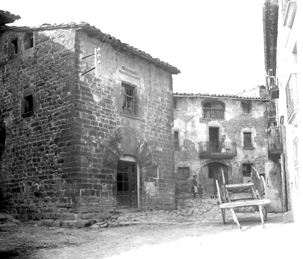 Cal Valeri a l'Estany. Marcel·lí Gausachs i Gausachs (Entre 1920 i 1930)